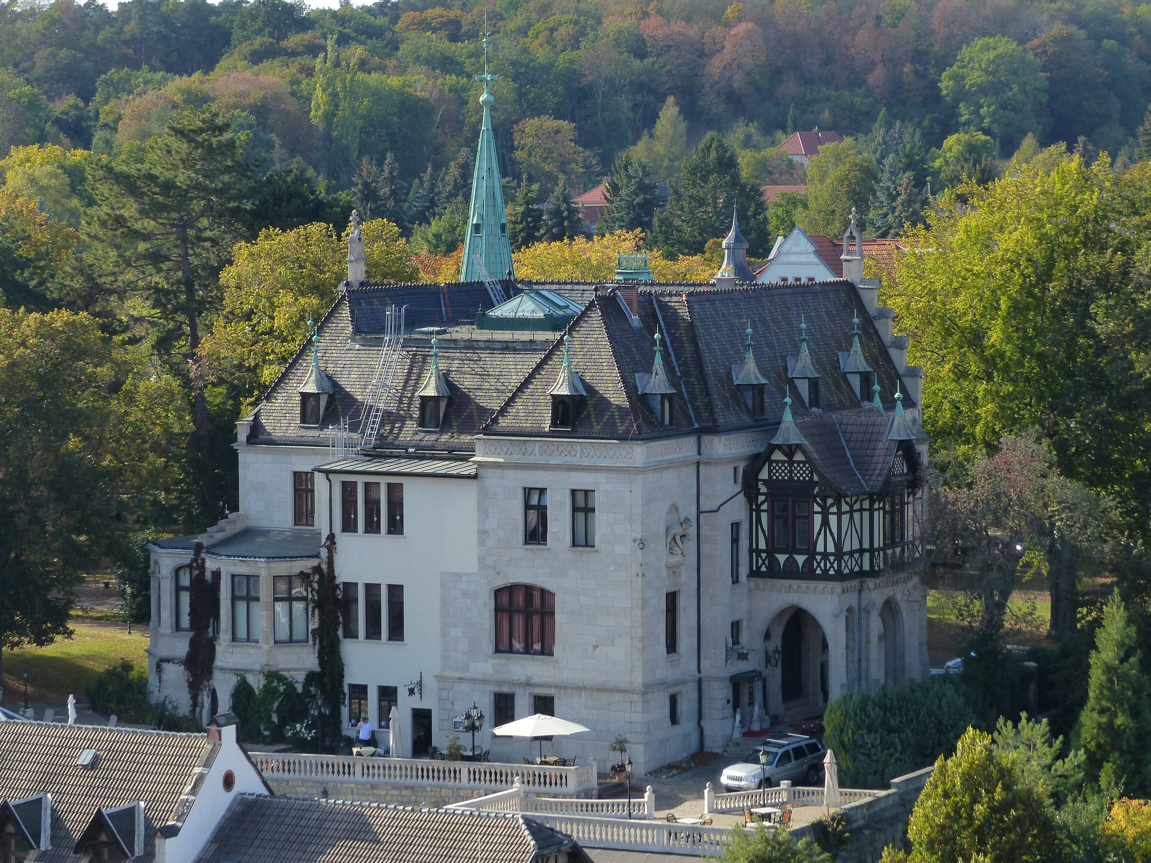 Lindenbeinsche Villa in Quedlinburg, Wallstraße 96. Blick vom Turm der Marktkirche (St. Benedikti)This is a photograph of an architectural monument.It is on the list of cultural monuments of Quedlinburg